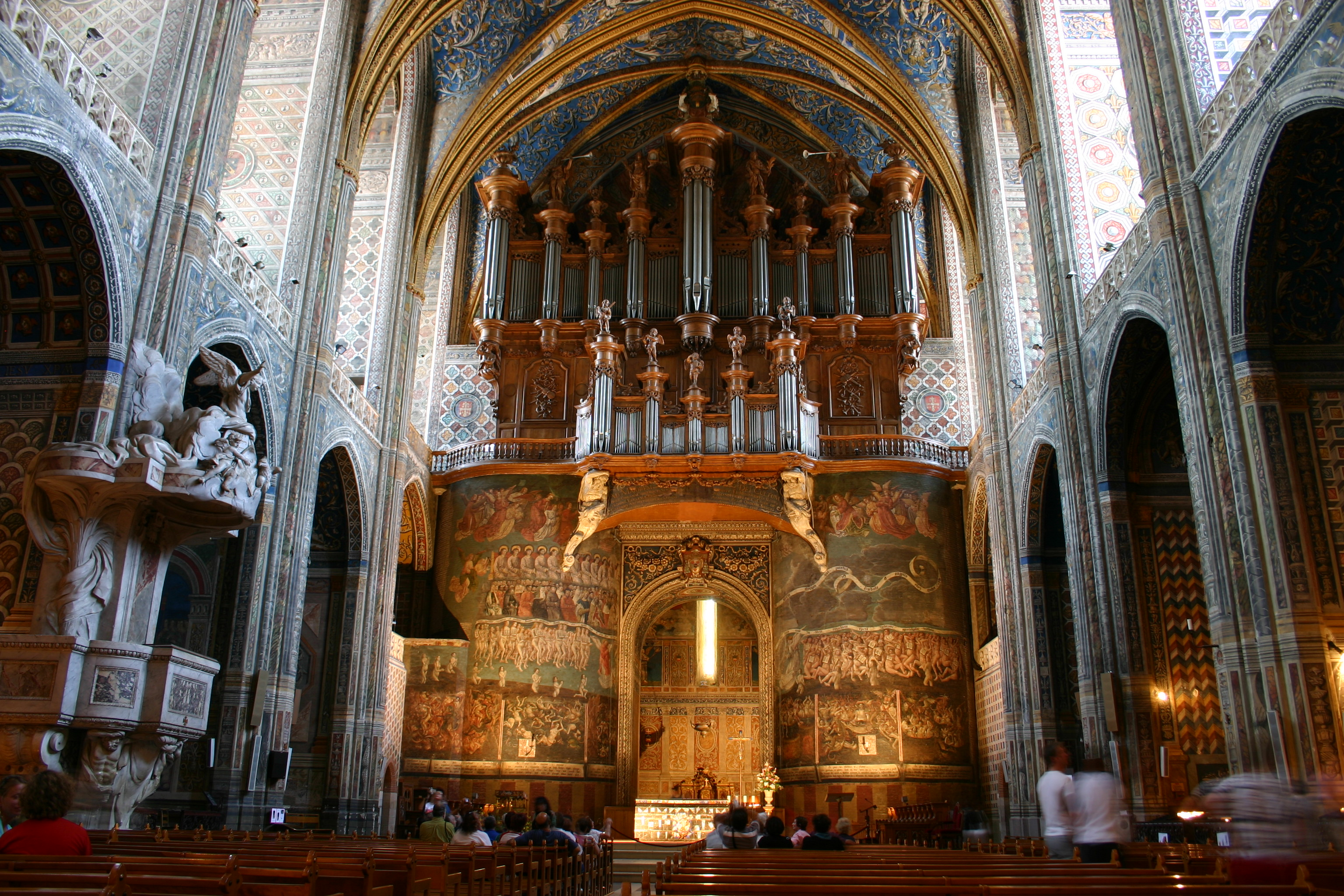 Les grandes orgues de la cathédrale Sainte-Cécile d'Albi Camera model : Canon EOS 300D DIGITAL Focal length : 18.0mm (35mm equivalent: 29mm) Exposure time: 3.200 s Aperture : f/5.6 ISO equiv. : 100